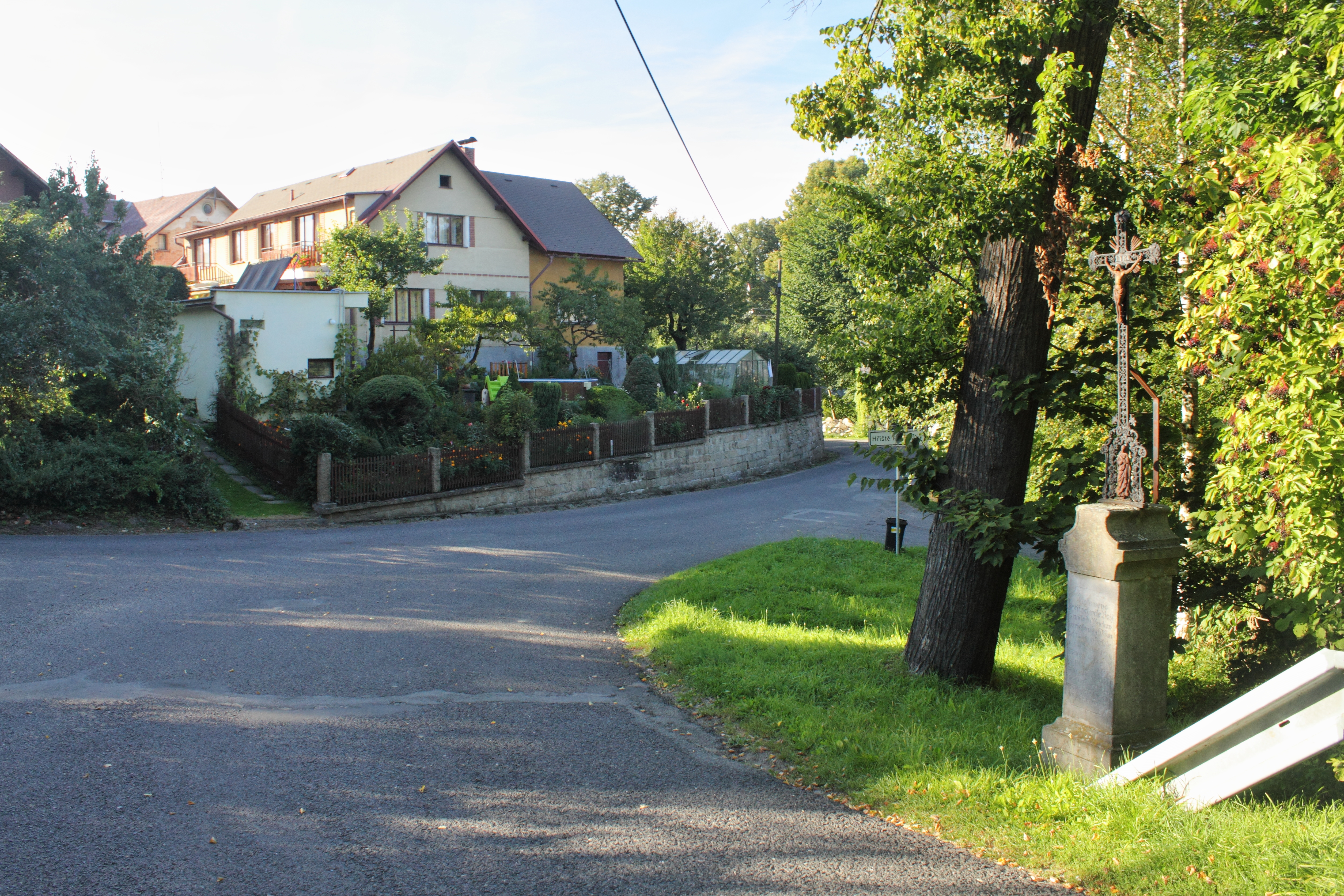 Střed obce Bílá